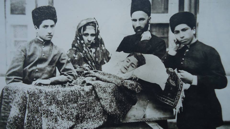 H.Z.Tağıyev və ailə üzvləri vəfat etmiş oğlu Kazımın tabutu önündə. Soldan sağa İsmayıl, birinci həyat yoldaşı Zeynəb xanım, Hacı və Sadıq.